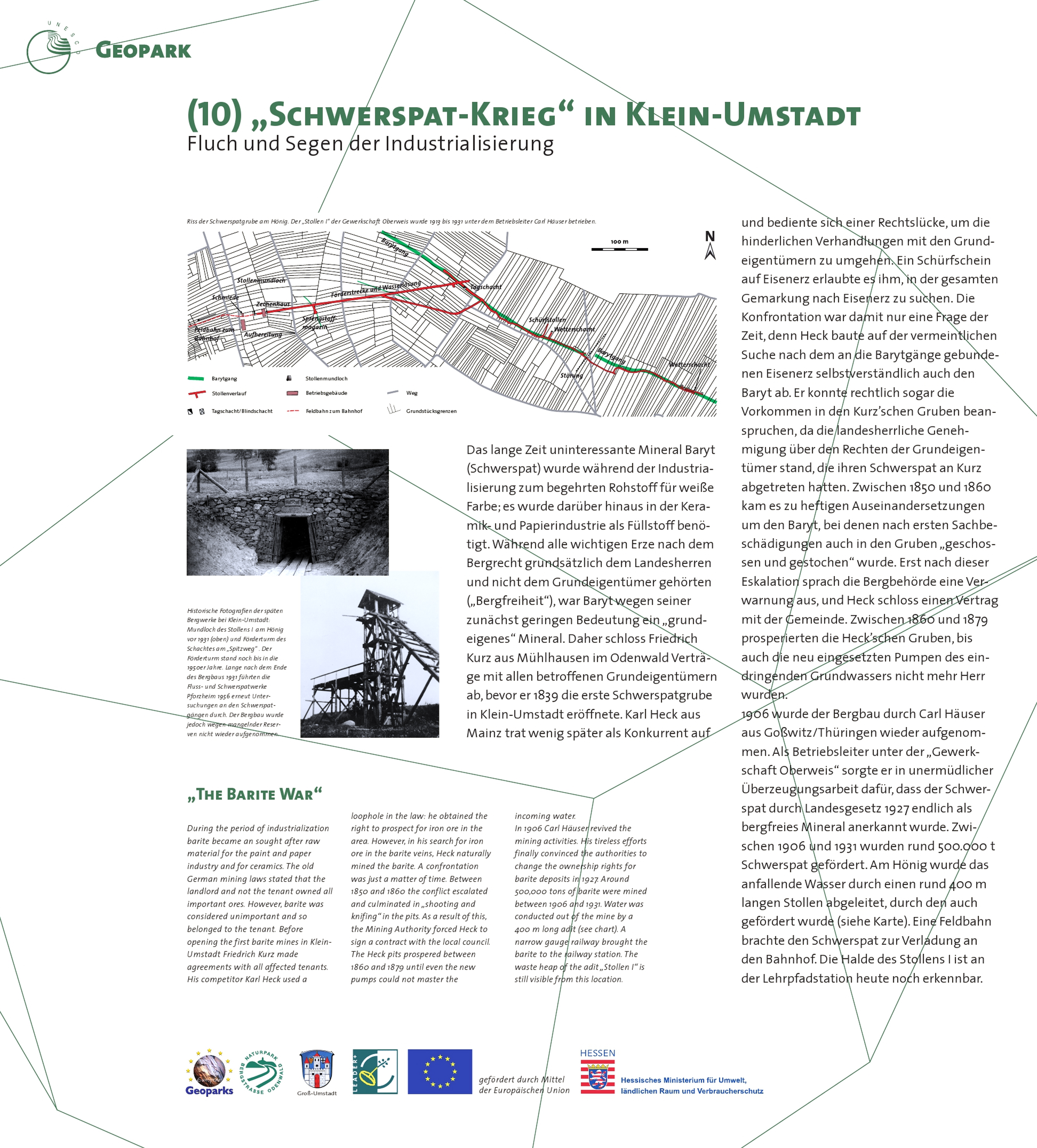 Infotafel zur Grube Hönig (Gewerkschaft Oberweis) bei Klein-Umstadt (Abbau von Schwerspat). Dauerhaft und öffentlich aufgestellte Informationstafel.